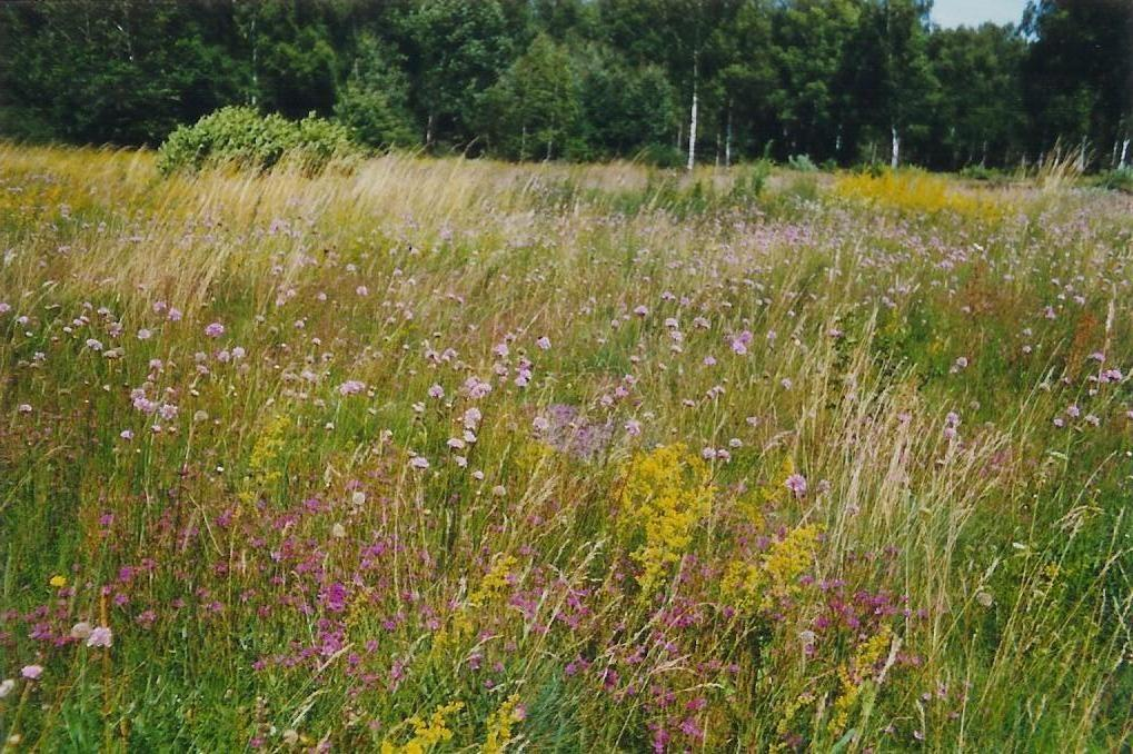 Kwiecista letnia murawa na poligonie WAT w Warszawie